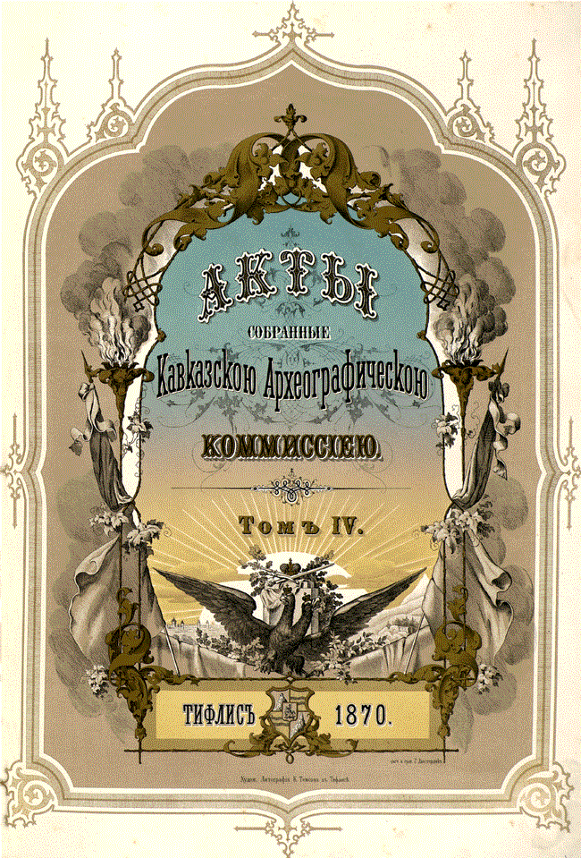 Title of book "Акты, собранные Кавказской археографической комиссией. / Под ред. А. П. Берже. — Тифлис: Тип. Главного Управления Наместника Кавказского, 1866-1904. — Том IV, 1870."